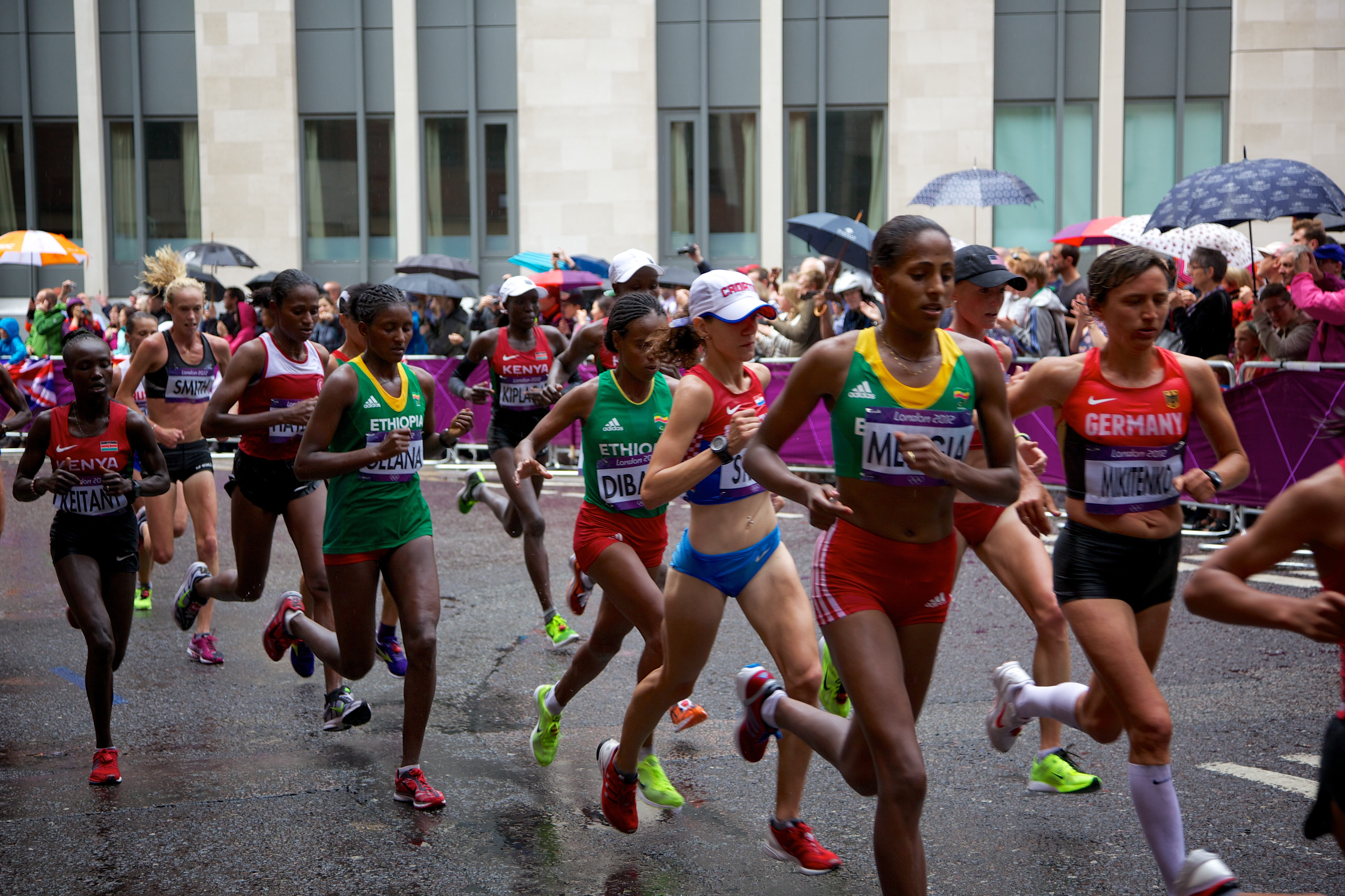 Women's Marathon, Mary Jepkosgei Keitany, Kimberley Smith, Sultan Haydar, Tiki Gelana, Edna Ngeringwony Kiplagat, Mare Dibaba, Lisa Christina Stublić, Aselefech Mergia, Irina Mikitenko